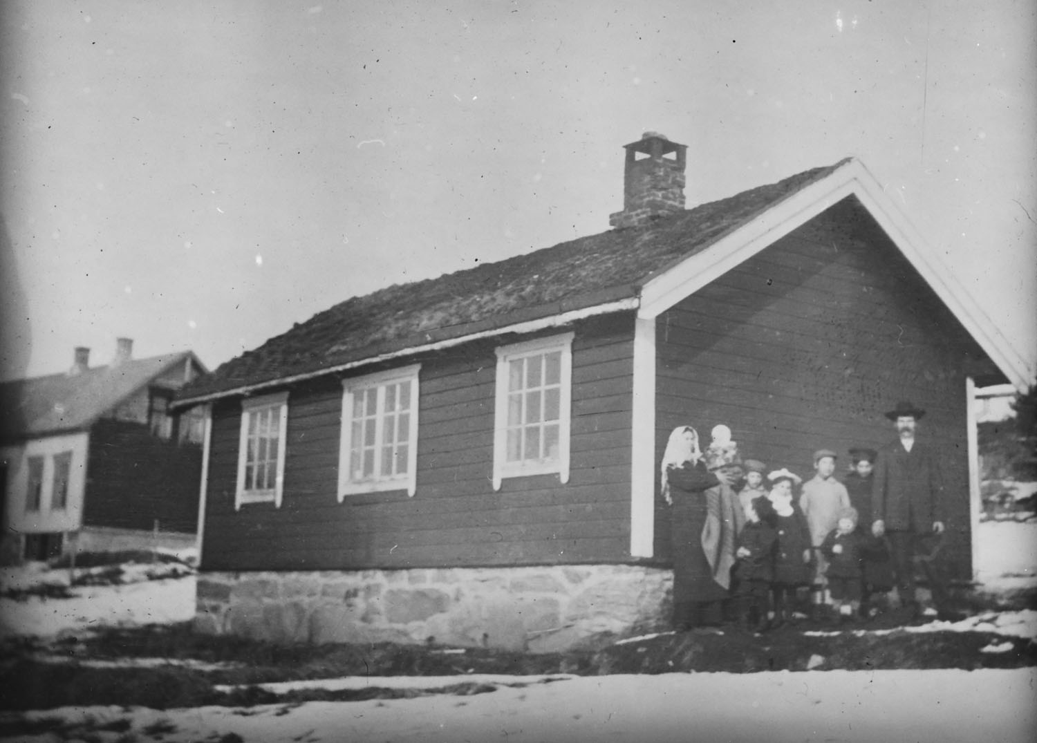 Fotograf: ukjent Sted: Eide kommune, Nordmøre, Norge/ Norway Arkivreferanse: Riksarkivet, PA-0793_870G NBR 9403:01388 url